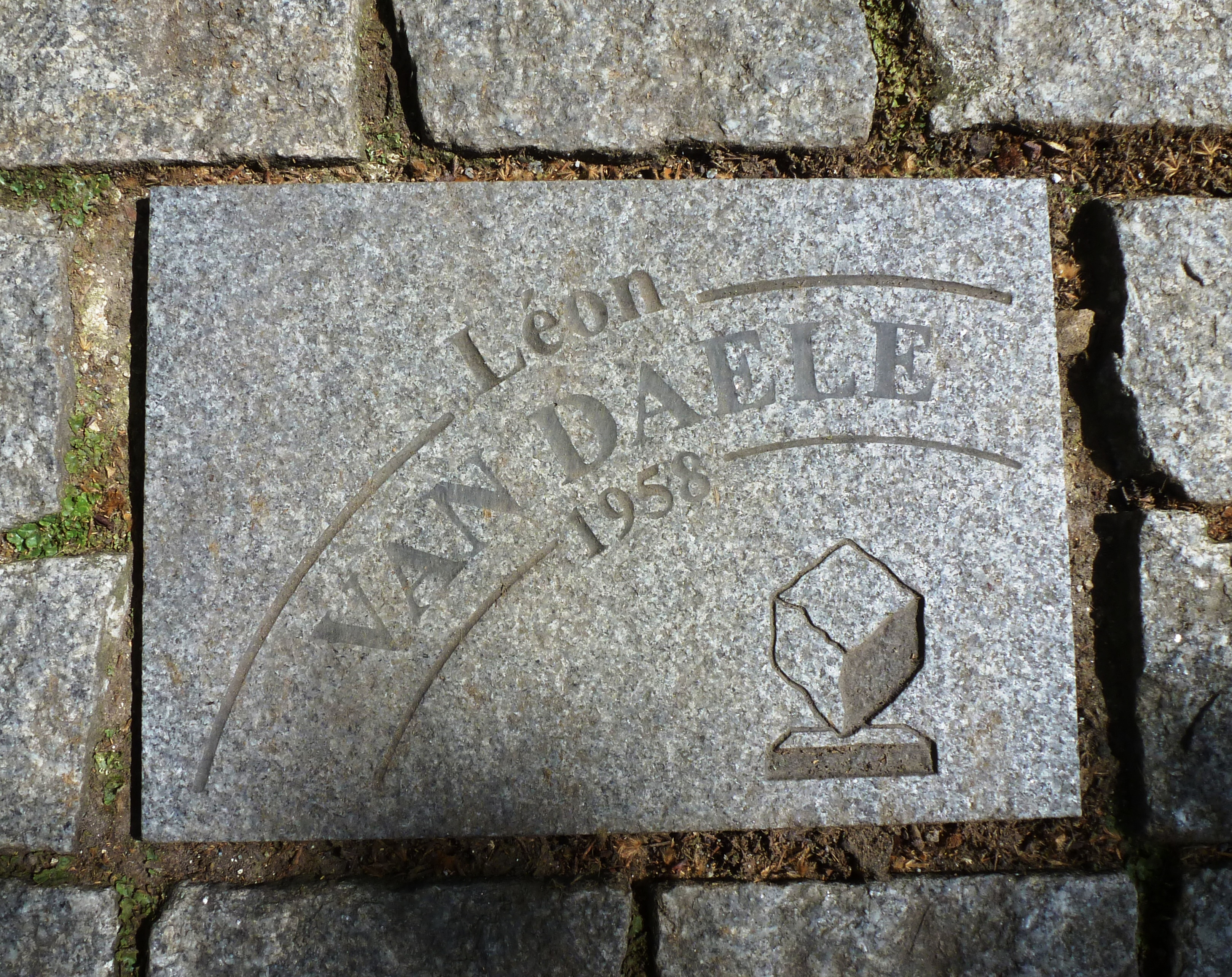 Pflasterstein für Léon Van Daele auf der Allée Charles Crupelandt in Roubaix